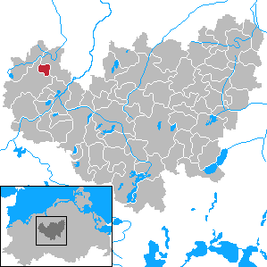 Penzin in Mecklenburg-Vorpommern - District Güstrow